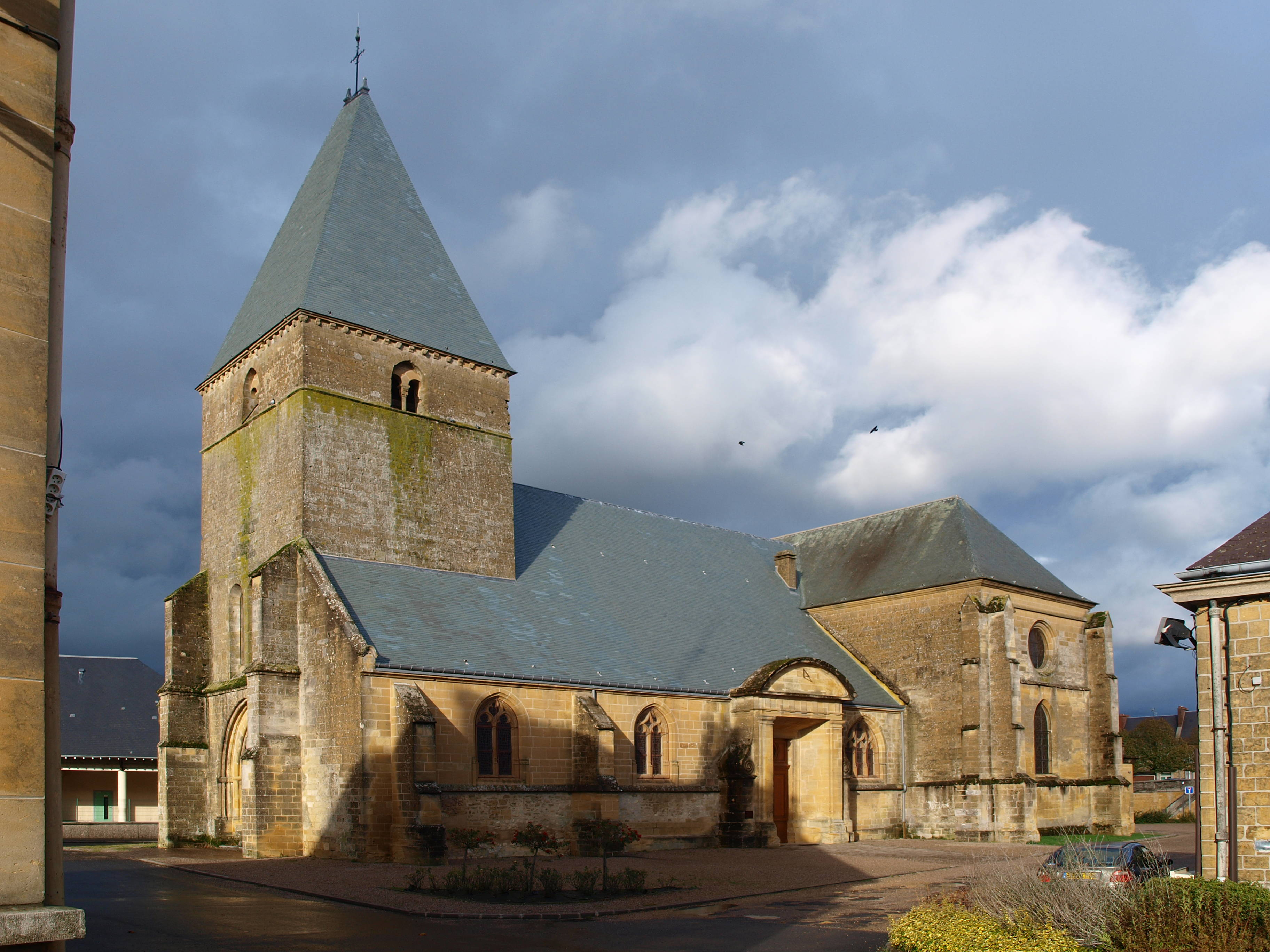 Église Saint-Jacques de Le Chesne (Ardennes, France)